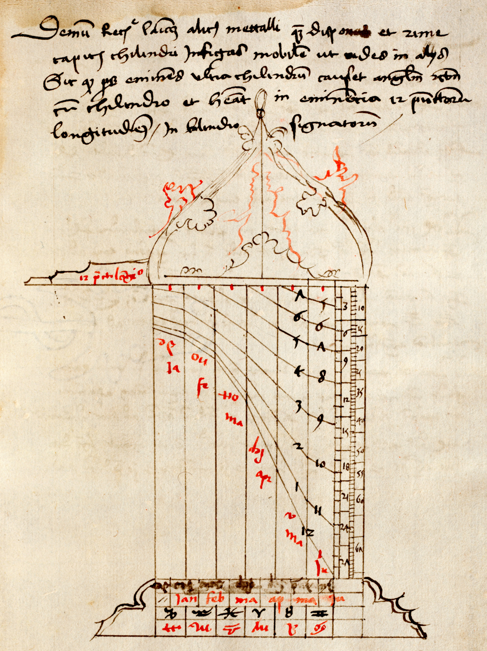 Dessin de cadran de berger, origine : Allemagne du sud